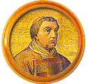 Medallón de la frise des papes de la basílica de San Pablo Extramuros, Roma. Es un retrato sobre mosaico que representa a Celestino IV, es el 179º papa de la Iglesia católica (1241-1241). Enlaza con la serie de medallones que reproducen la figura de todos los Papas de la historia.